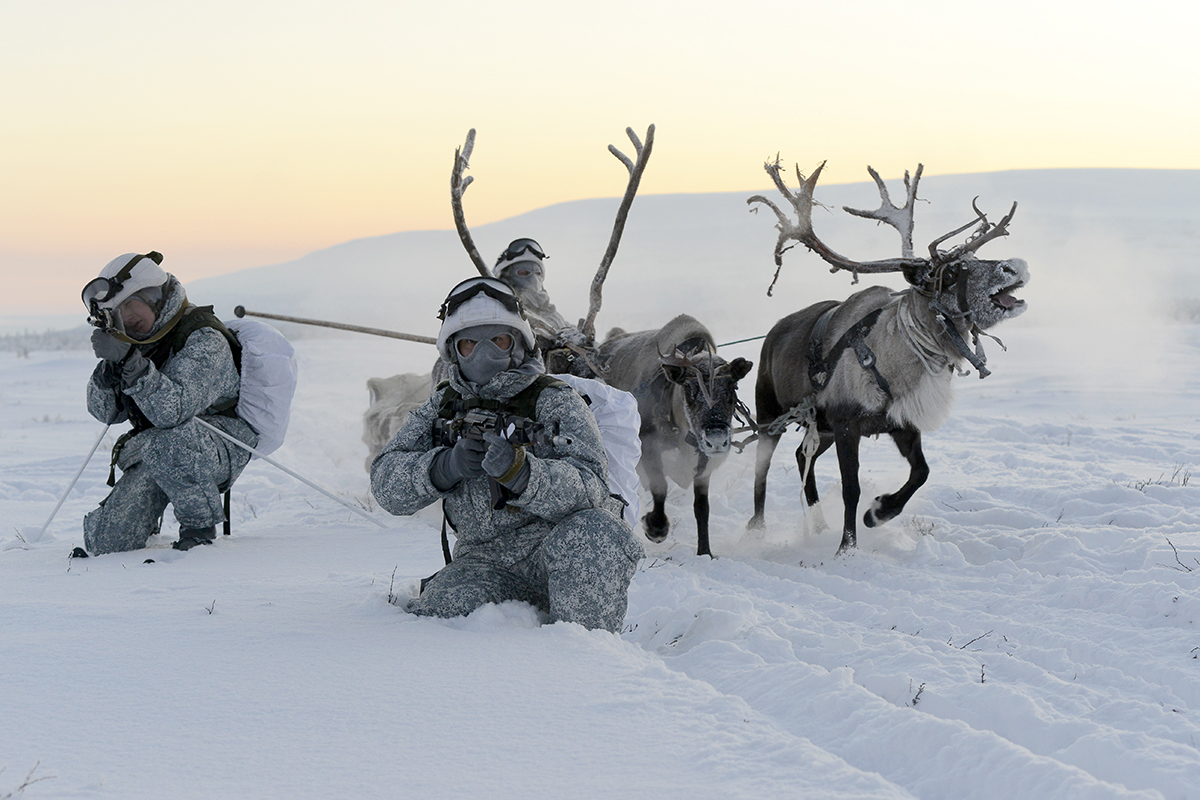 Arctic troops of the Russian Federation.